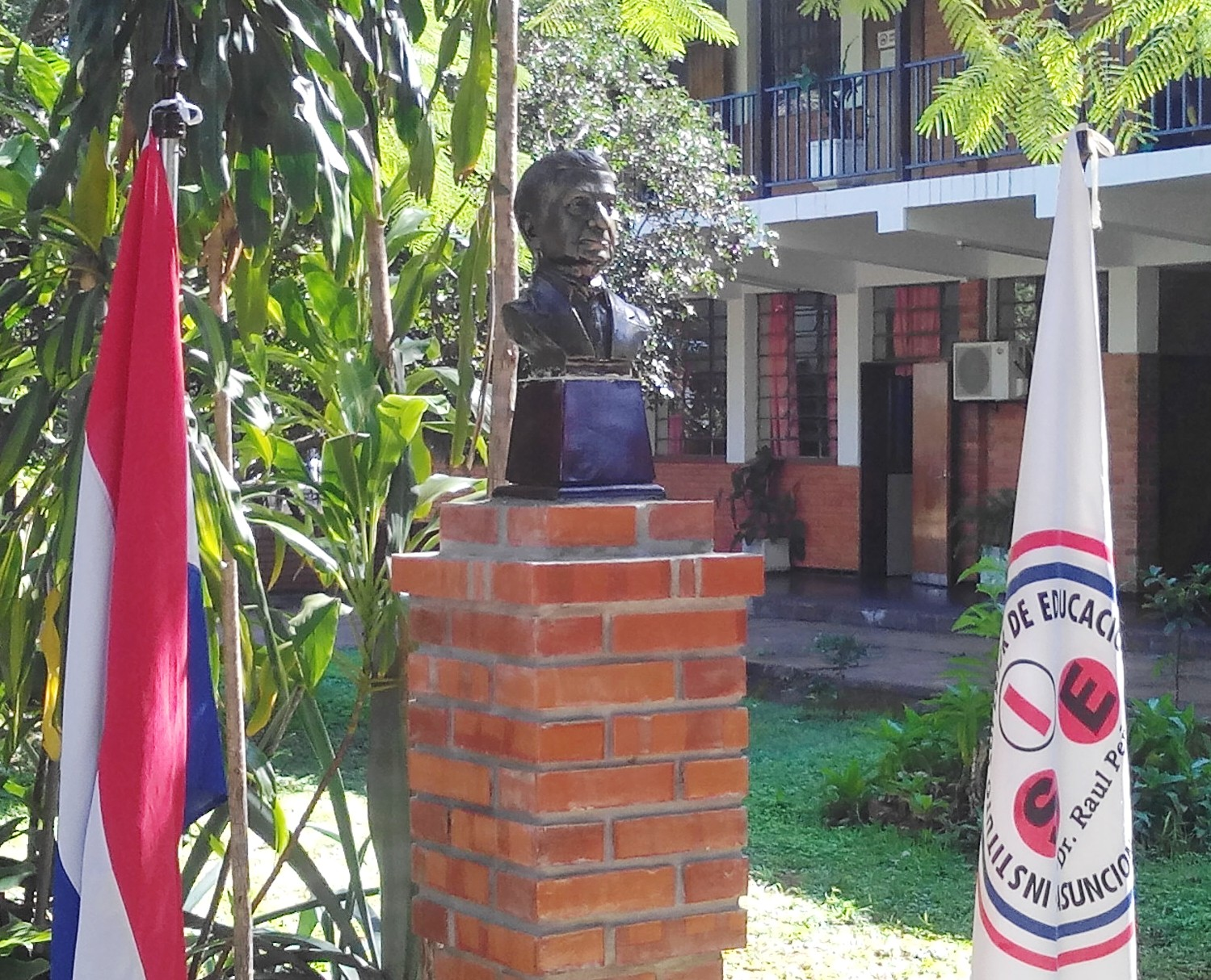 Homenaje en el Instituto Superior de Educación